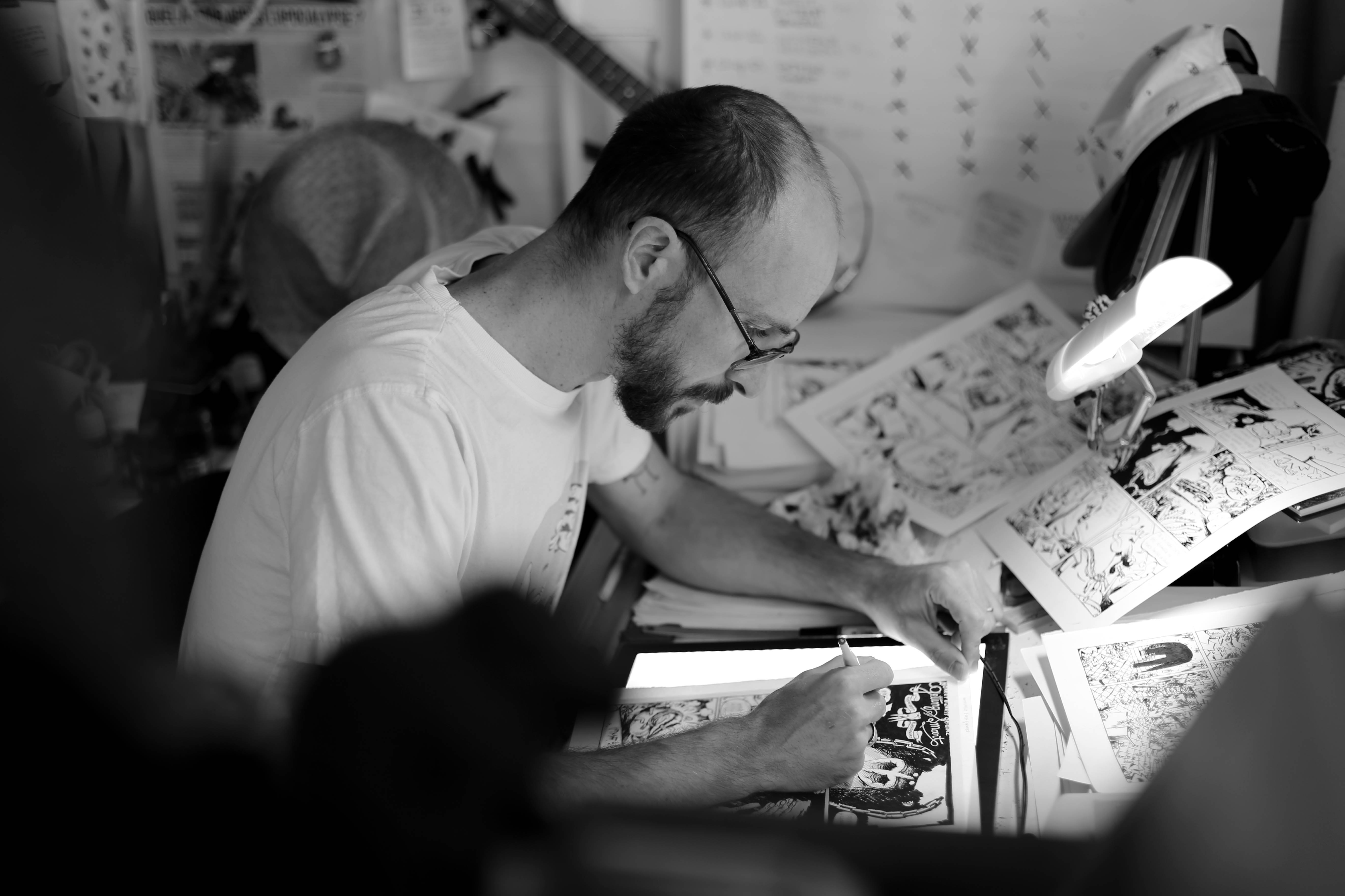 Pozla